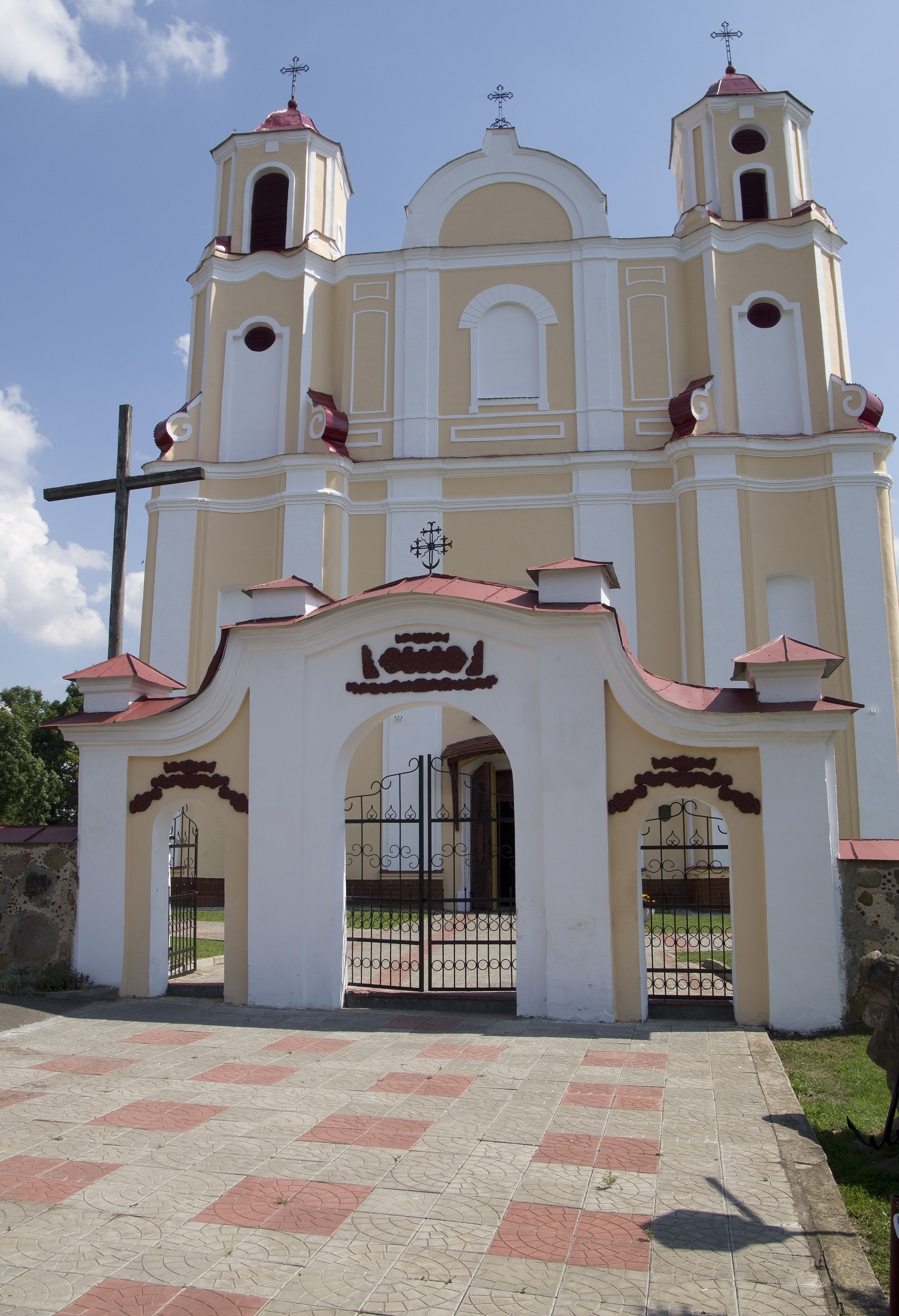 Беларуская (тарашкевіца): Касьцёл Яна Хрысьціцелясем алтароў касьцёлу. в. Васілішкі This is a photo of Belarusian heritage monument. Reference number: 412Г000616 ( WLM)